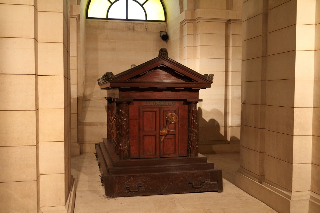 Tombe de Jean-Jacques ROUSSEAU au Panthéon de Paris en septembre 2013, Île-de-France, France.